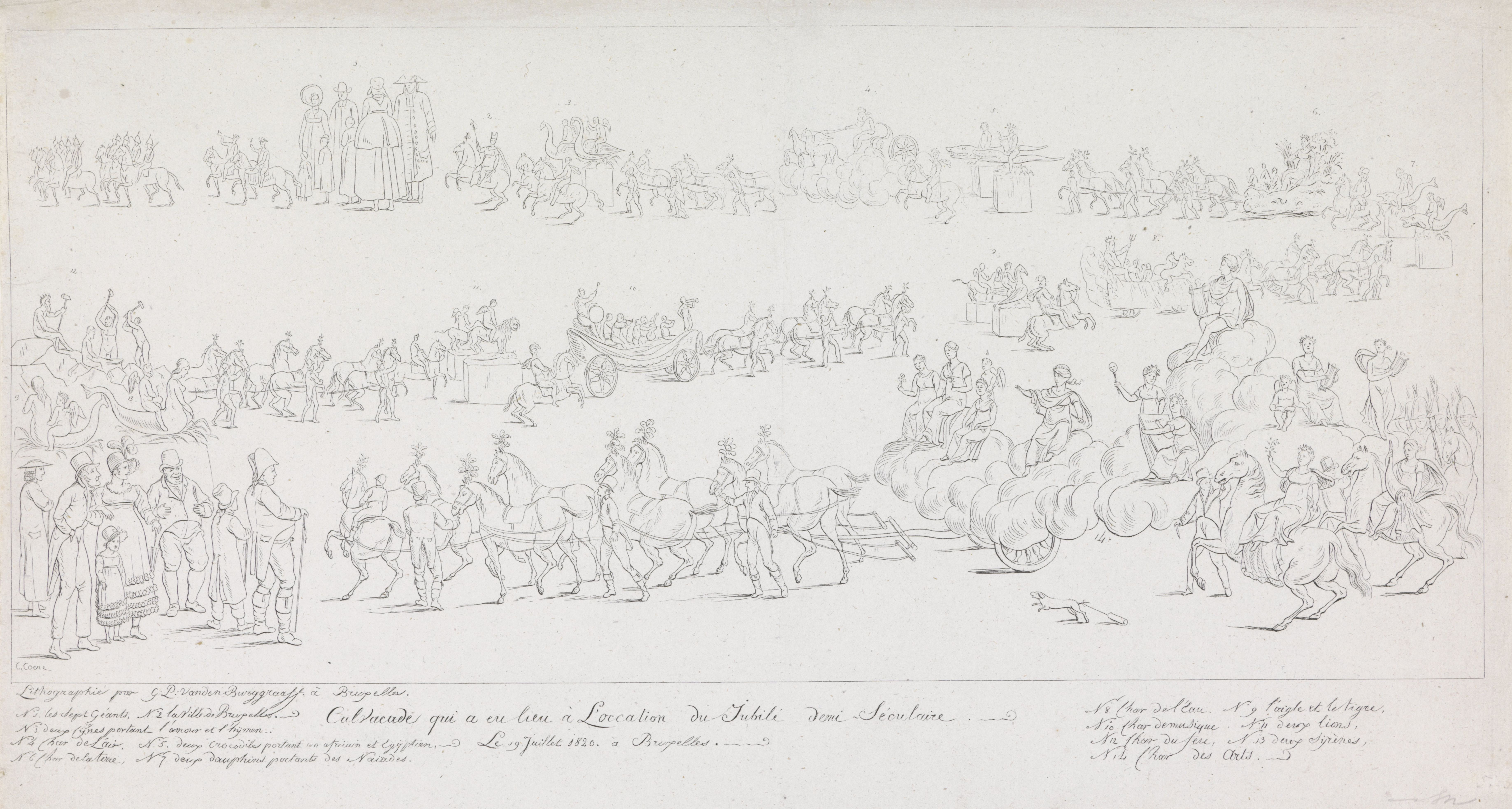 IdentificatieTitel(s): Optocht bij de viering van het 450-jarig jubileum van het Sacrament van Mirakel te Brussel, 1820Calvacade qui a eu lieu à Loccation du Jubilé demi Séculaire. Le 19 Juillet 1820. à Bruxelles (titel op object)Objecttype: prent Objectnummer: RP-P-OB-87.372Catalogusreferentie: FMH 6147Opschriften / Merken: verzamelaarsmerk, verso, gestempeld: Lugt 2228Omschrijving: Feestelijke optocht afgebeeld in drie rijen boven elkaar bij de viering van het 450-jarig jubileum van het Sacrament van Mirakel te Brussel, 19 juli 1820. Links een groepje toeschouwers. Links en rechts de legenda met de nummers van de praalwagens 1-14 in het Frans.VervaardigingVervaardiger: prentmaker: Guillaume Philidor Van den Burggraaff (vermeld op object)naar tekening van: Constantinus Fidelio Coene (vermeld op object)Plaats vervaardiging: BrusselDatering: 1820Fysieke kenmerken: lithografieMateriaal: papier Techniek: lithografie (techniek)Afmetingen: blad: h 278 mm × b 517 mmOnderwerpWat: rejoicing on special occasions (+ decorated float, wagon ~ festive activities)Sacrament van Mirakel (Brussel)Wanneer: 1820-07-19 - 1820-07-19Waar: BrusselVerwerving en rechtenVerwerving: aankoop 1881Copyright: Publiek domein